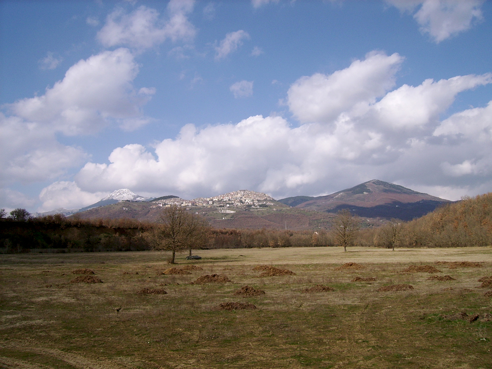 Veduta del comune di Viggiano, Basilicata